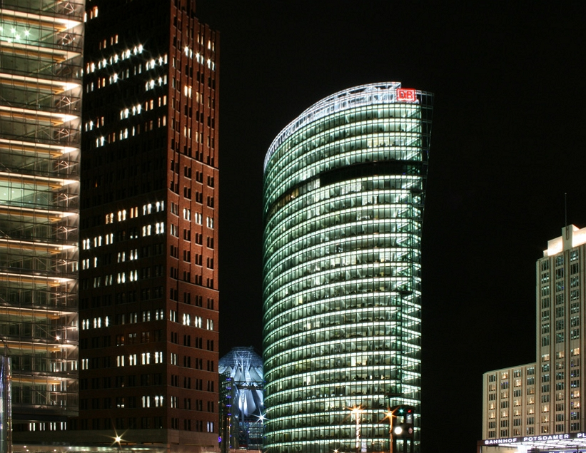 Berlin, Potsdamer Platz